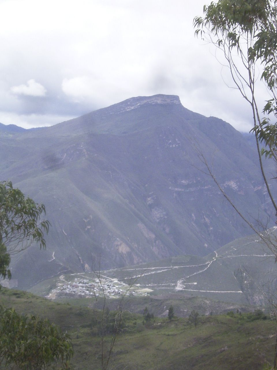 el Tingo, Provincia de Luya, Región Amazonas, Perú